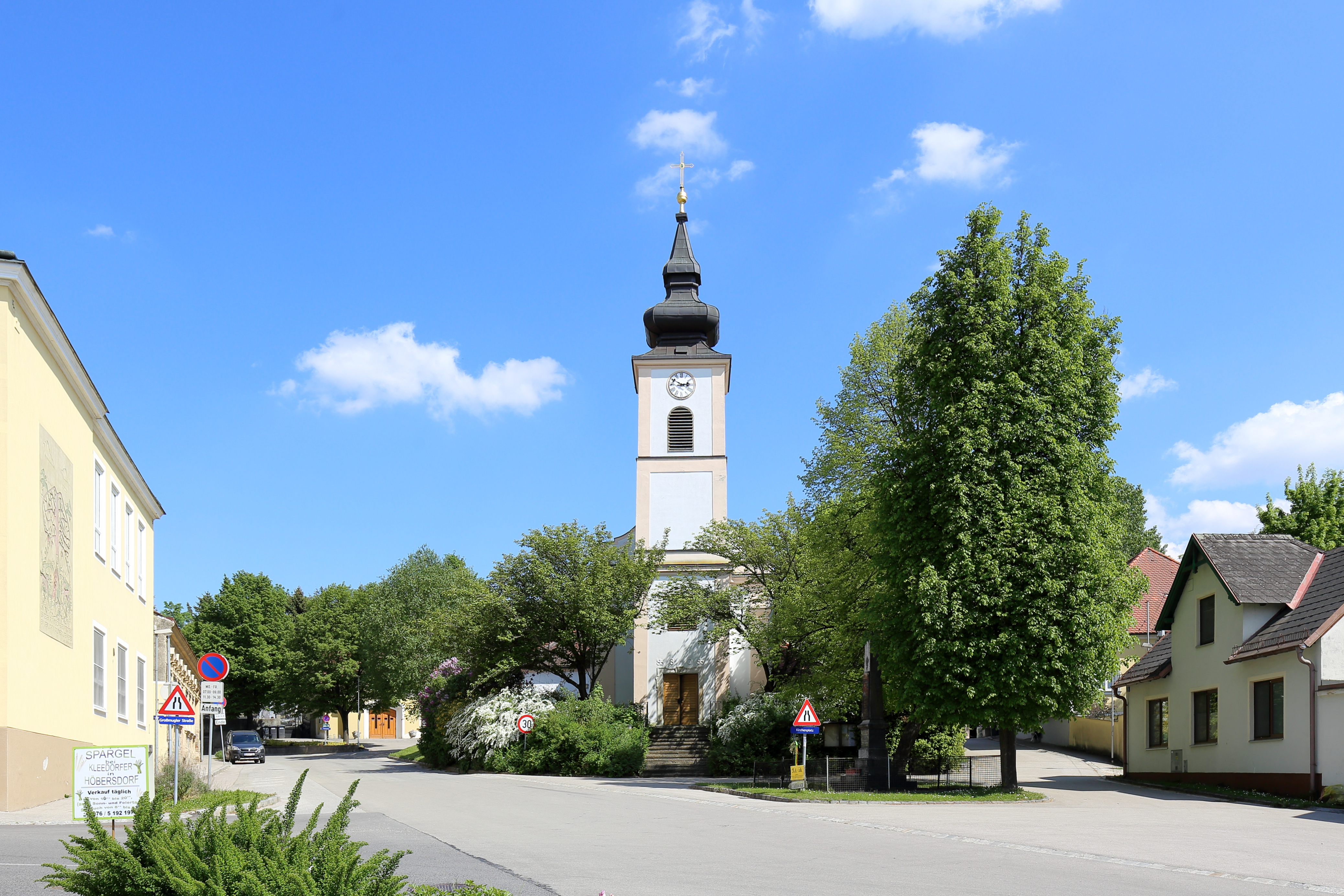 Westansicht der römisch-katholischen Pfarrkirche hl. Johannes der Täufer in Höbersdorf, ein Ortsteil der niederösterreichischen Marktgemeinde Sierndorf.Eine spätbarocke Saalkirche mit einem Fassadenturm, errichtet um die 18./19. Jahrhundertwende.